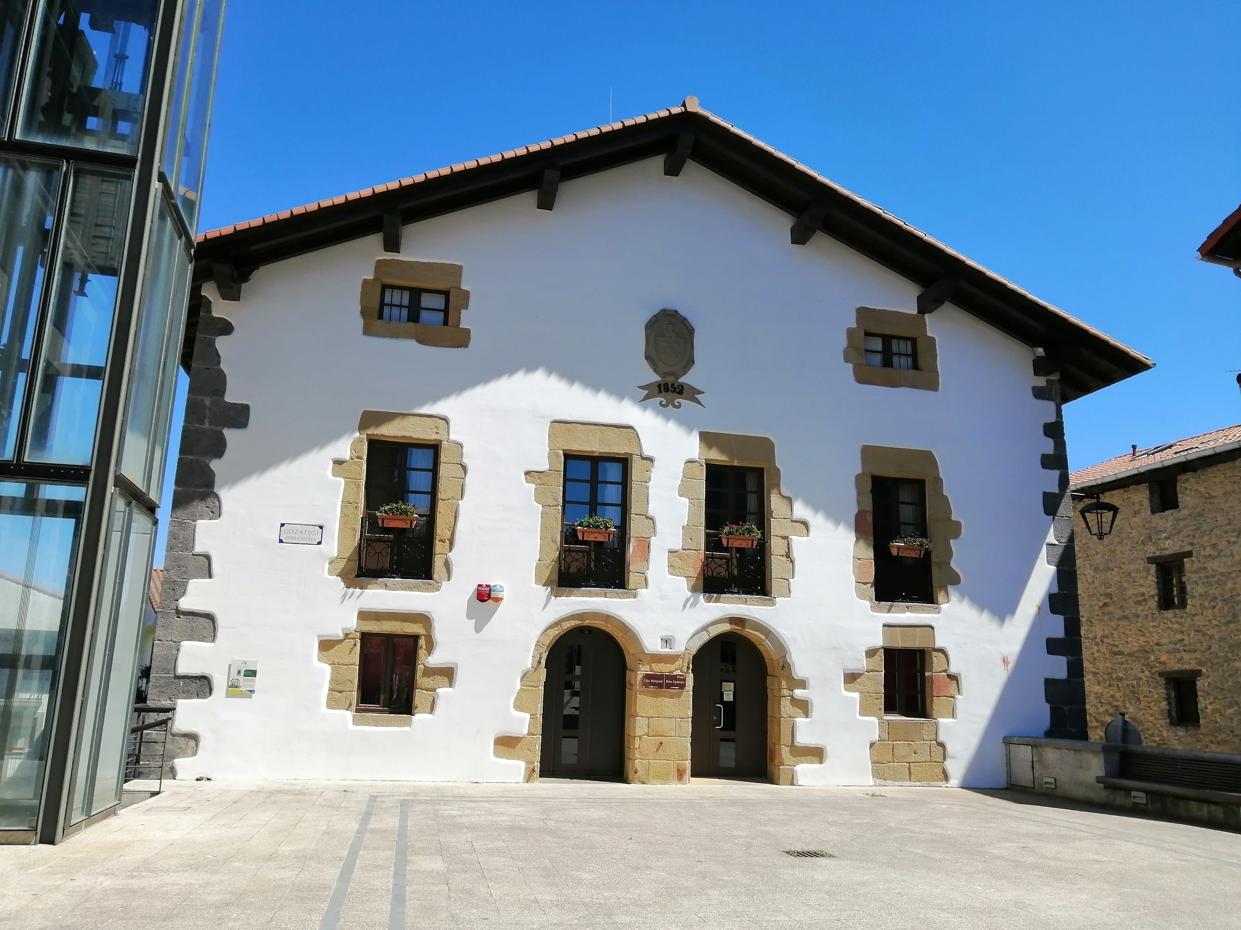 Aiako udaletxea